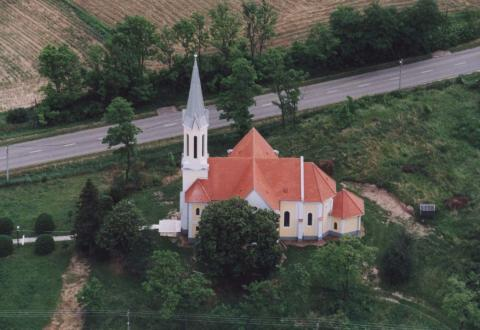 Mohora, Hungary, aerialphotography. Kisboldogasszony római katolikus templom